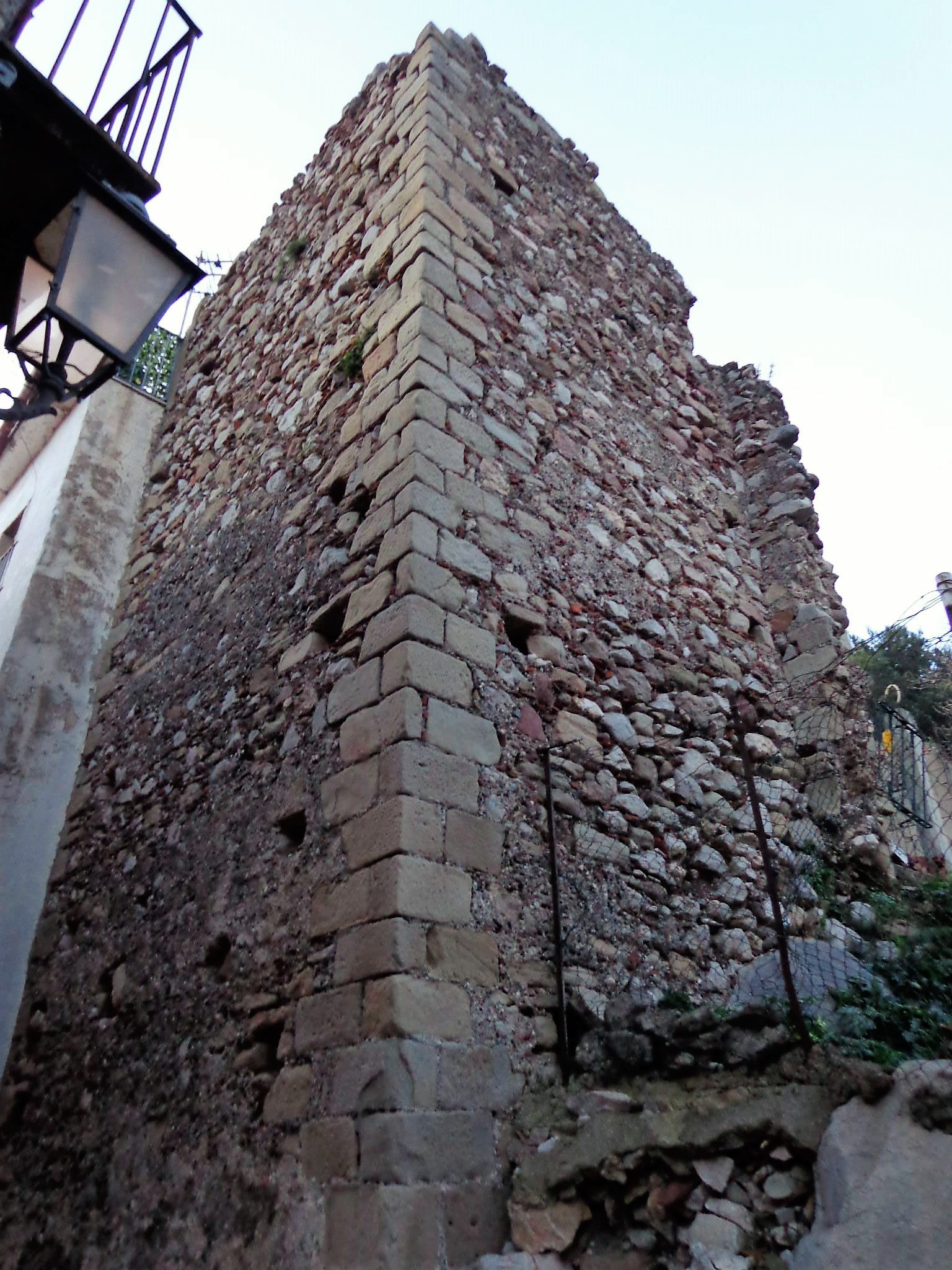 Castello di Novara di Sicilia, ruderi. Natale 2015, scatto già presente su profilo personale FB.